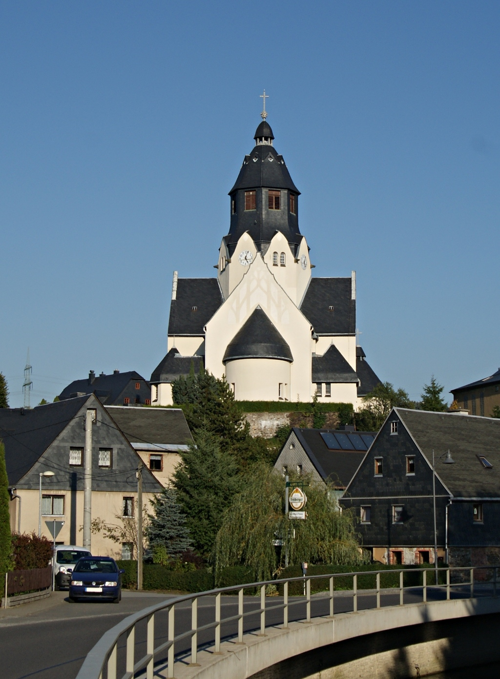 Kirche Wiesa